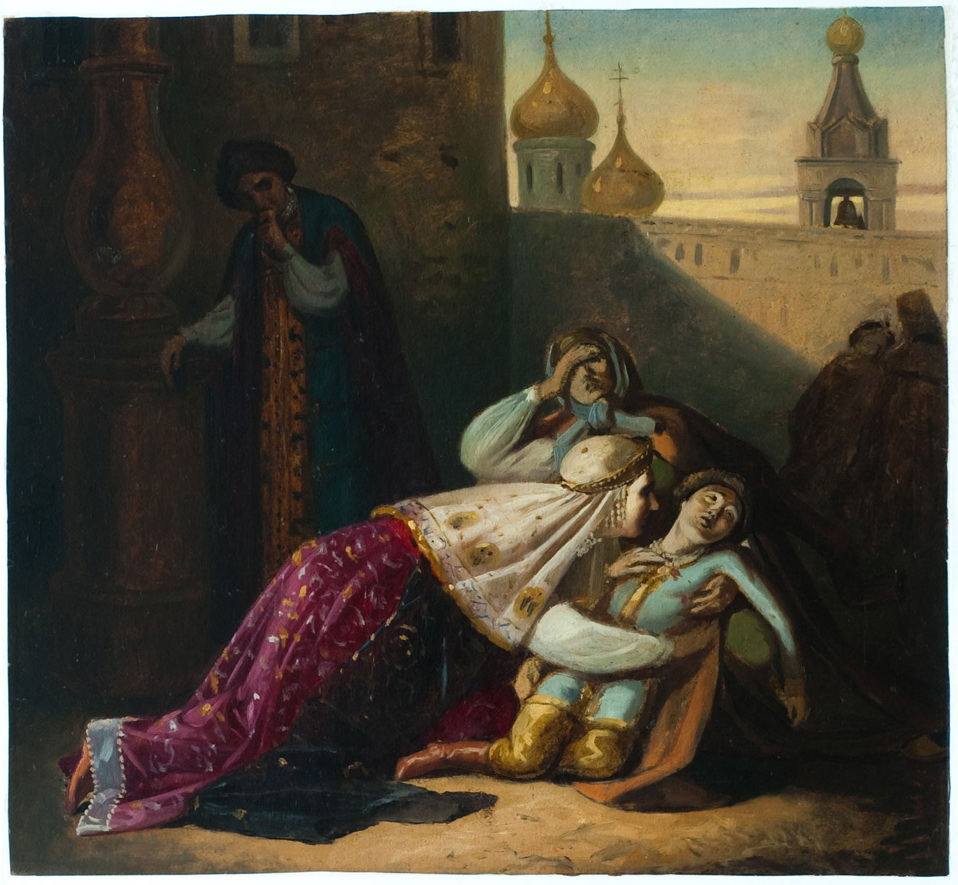 ПЛЕШАНОВ П. Ф. УБИЕНИЕ ЦАРЕВИЦА ДМИТРИЯ В УГЛИЧЕ. Вторая половина ХIХ века Бумага, масло. 38,2 х 42 Ж-1143. ГРМ